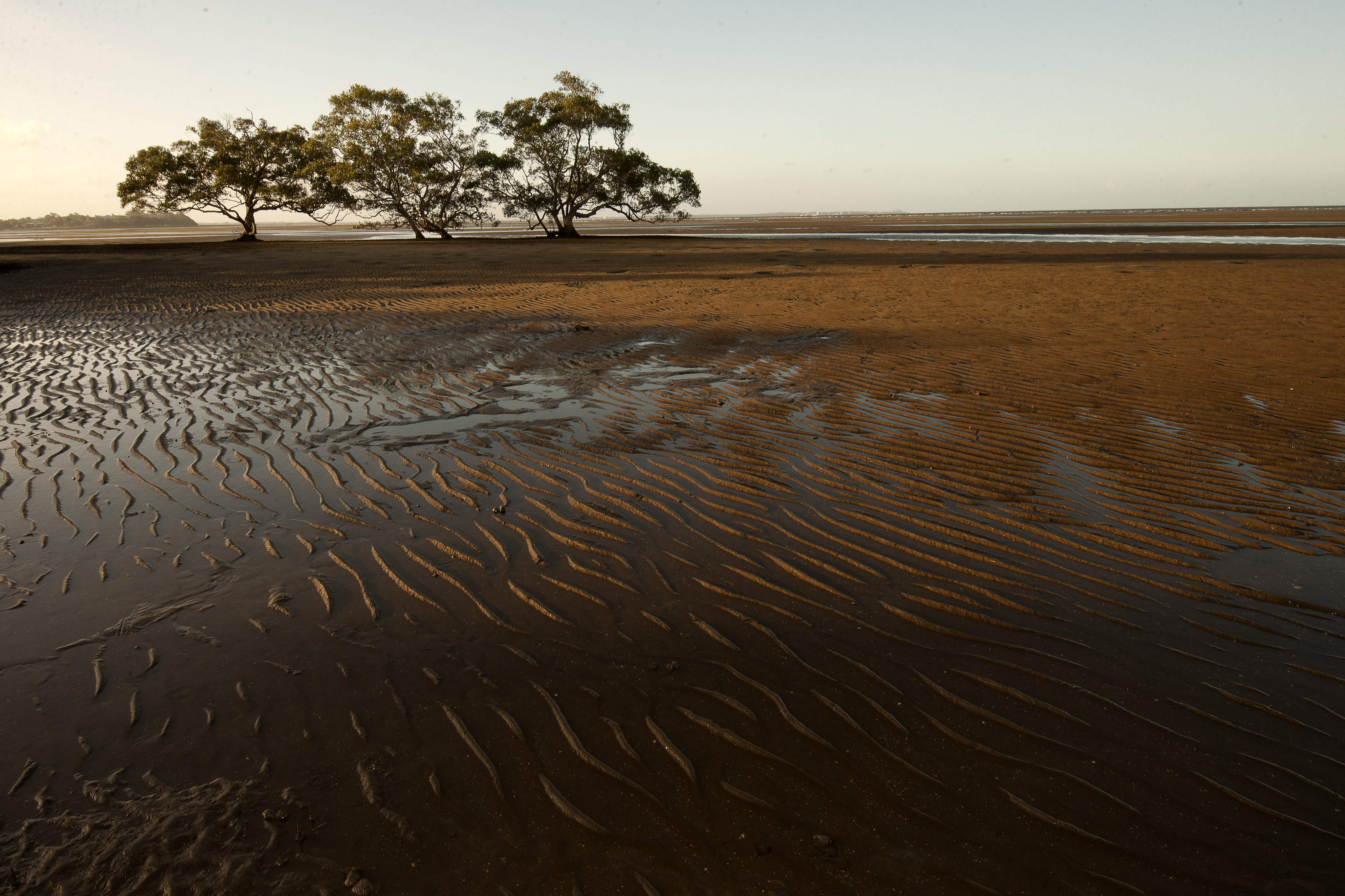 Boondall Wetlands